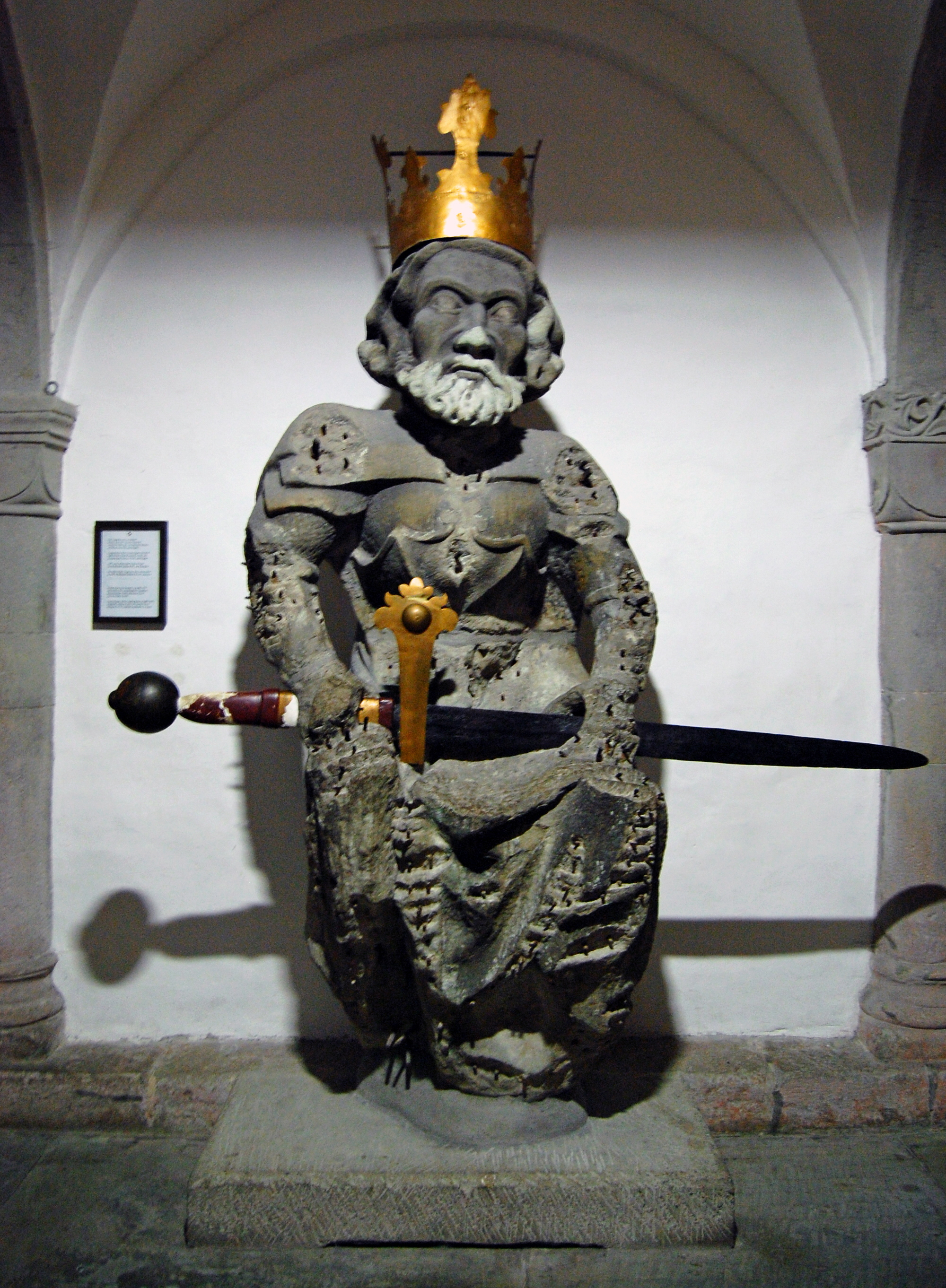 Statue Karls des Grossen in der Krypta des Grossmünster zu Zürich. Auf der Informationstafel links steht: "Statue Karls des Grossen, ca. 1450 - 1475 entstanden. Ihr ursprünglicher Standort: limmatseitige Nische am Karls-Turm (durch Kopie ersetzt)"